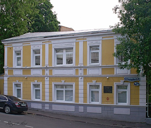 Московский дом, где в 1930-1940-х гг. жили Брики.